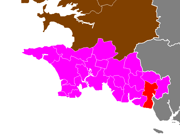 Maps of arrondissements and cantons of France: Arrondissement de Quimper - Canton de Quimperlé.PNG (Département du Finistère , Arrondissement de Quimper)